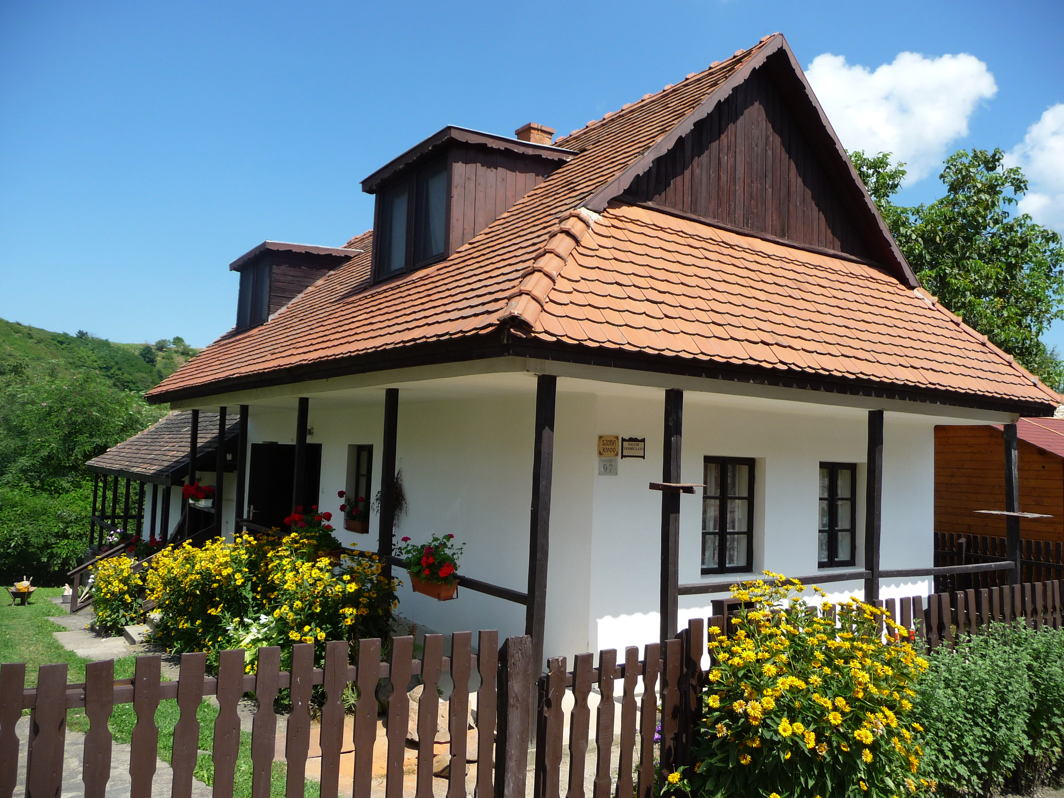 Hollókő, Kossuth u. 97.